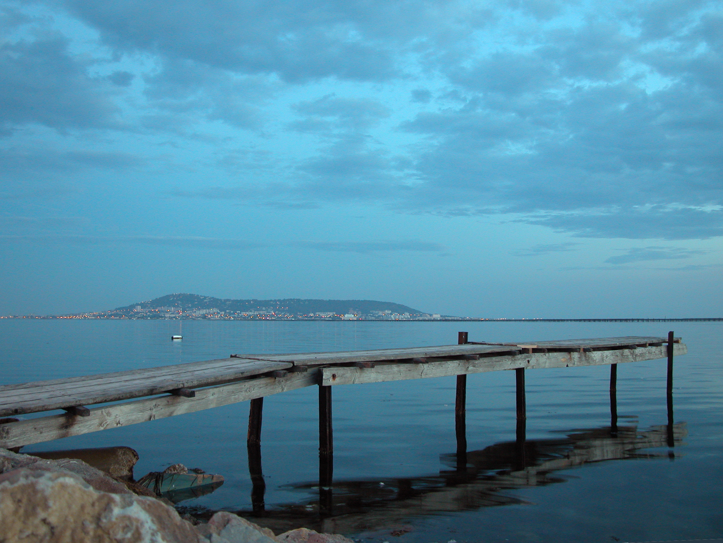 Étang de Thau et montagne de Sète vus de Bouzigues - Photo personnelle non retouchée.